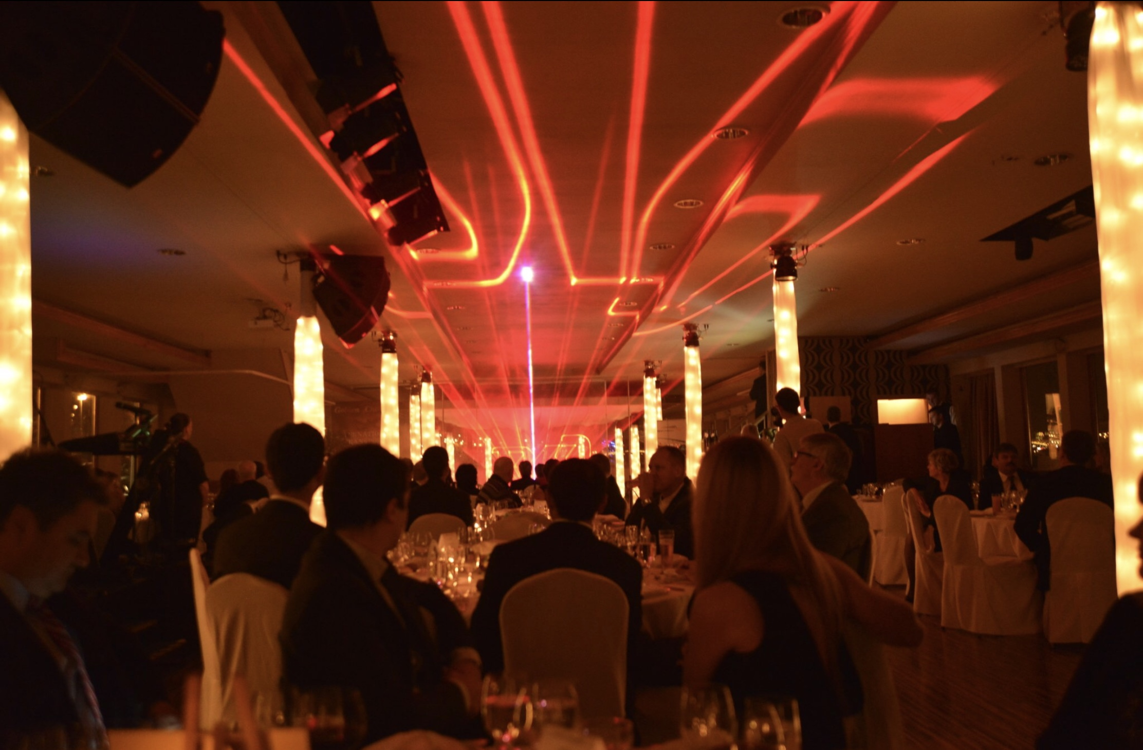 Церемония награждения на теплоходе "Европа" Венгрия, г. Будапешт